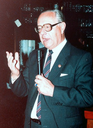 1985 Der langjährige Vorsitzende des VfV Hildesheim Ernst Kipker. Begrüßungsrede auf einem Fest der Tennisabteilung. Aufnahme: VfV-Tennisabteilung